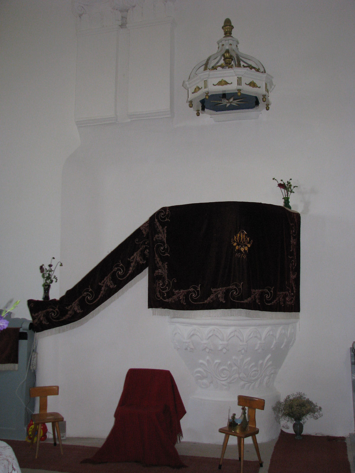 Cófalvi református templom belseje